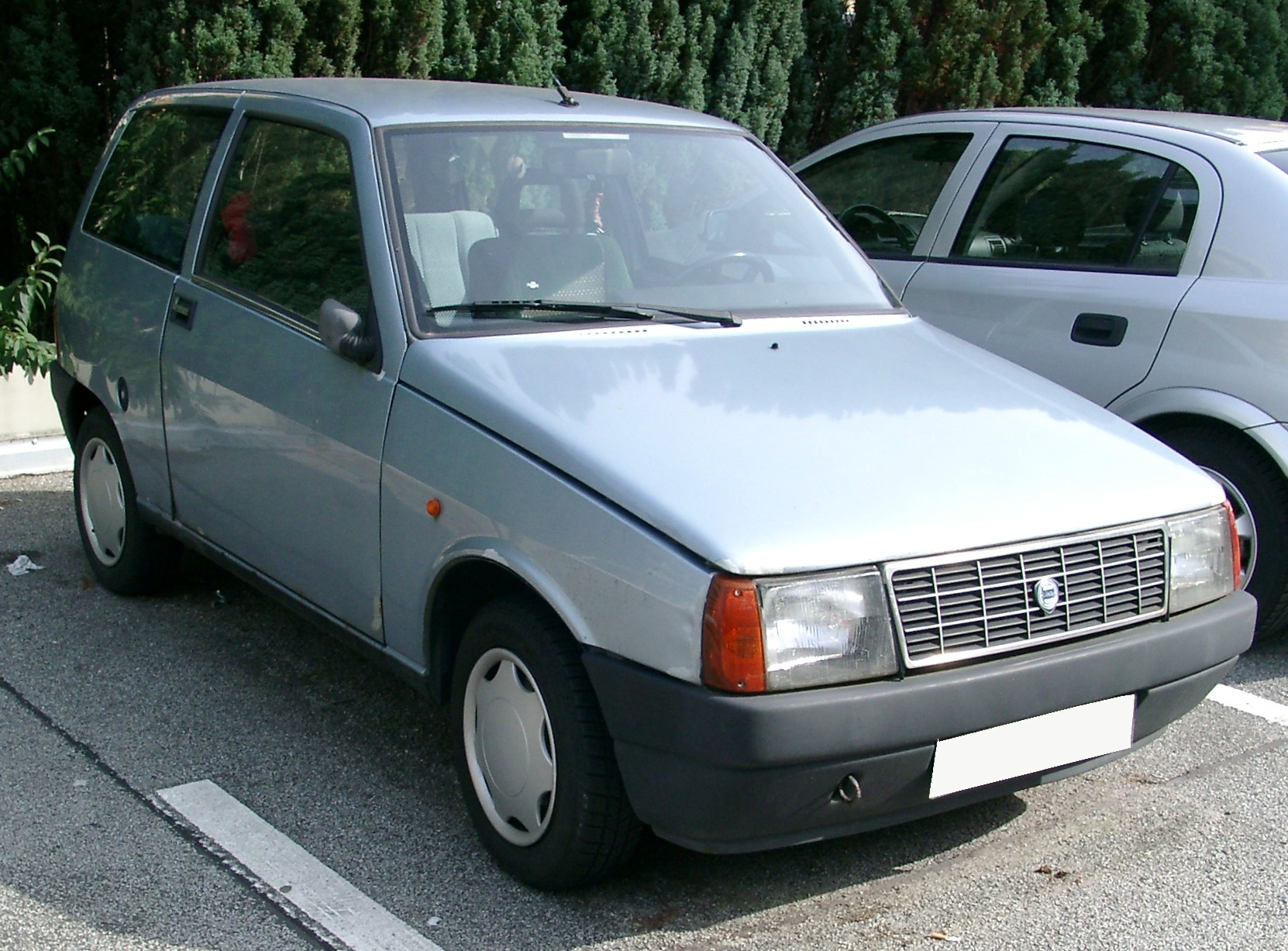 Lancia Y10